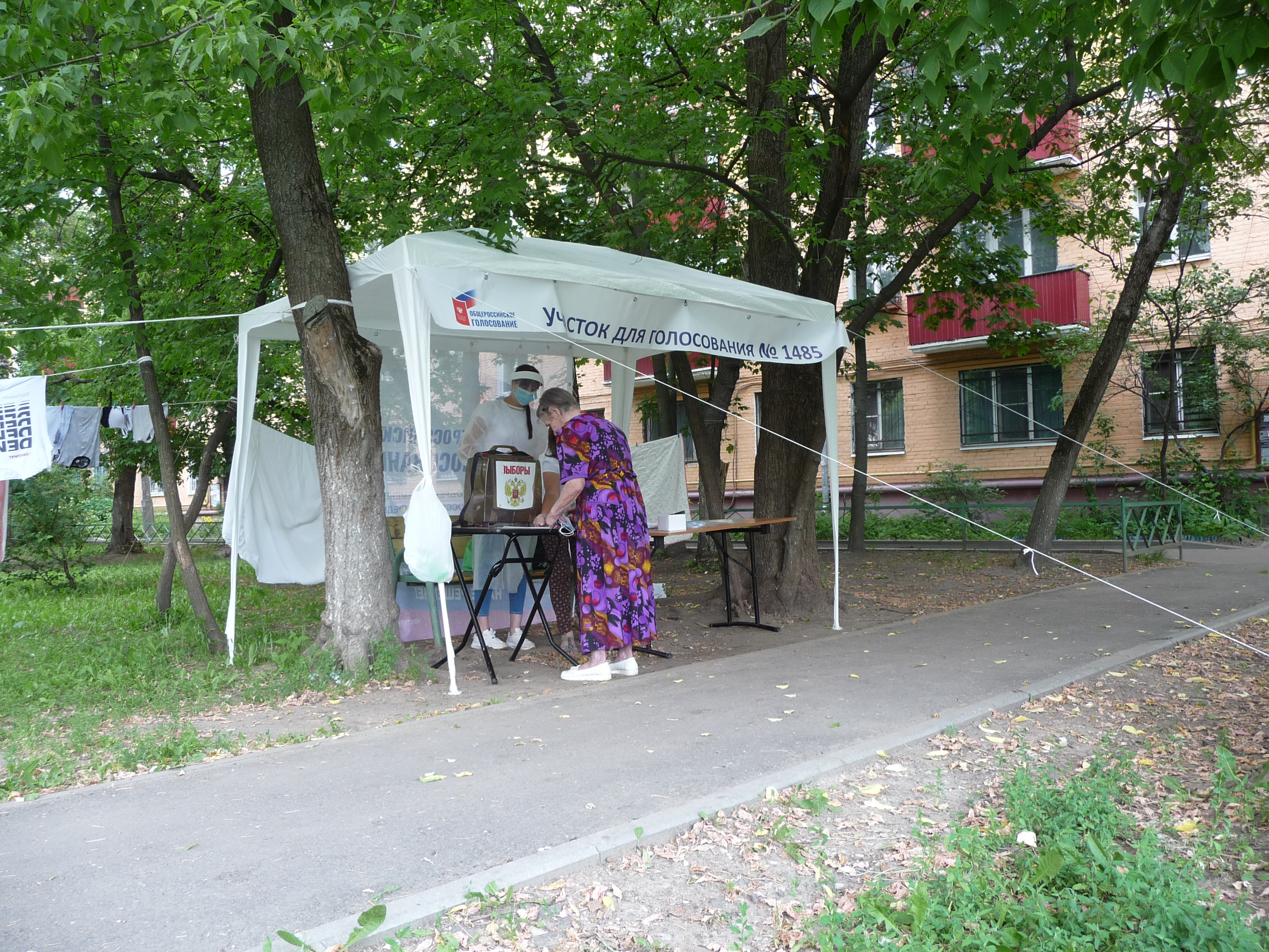 Передвижной пункт голосования по поправкам к Конституции. Люберцы, Октябрьский проспект, д 388 27.07.2020